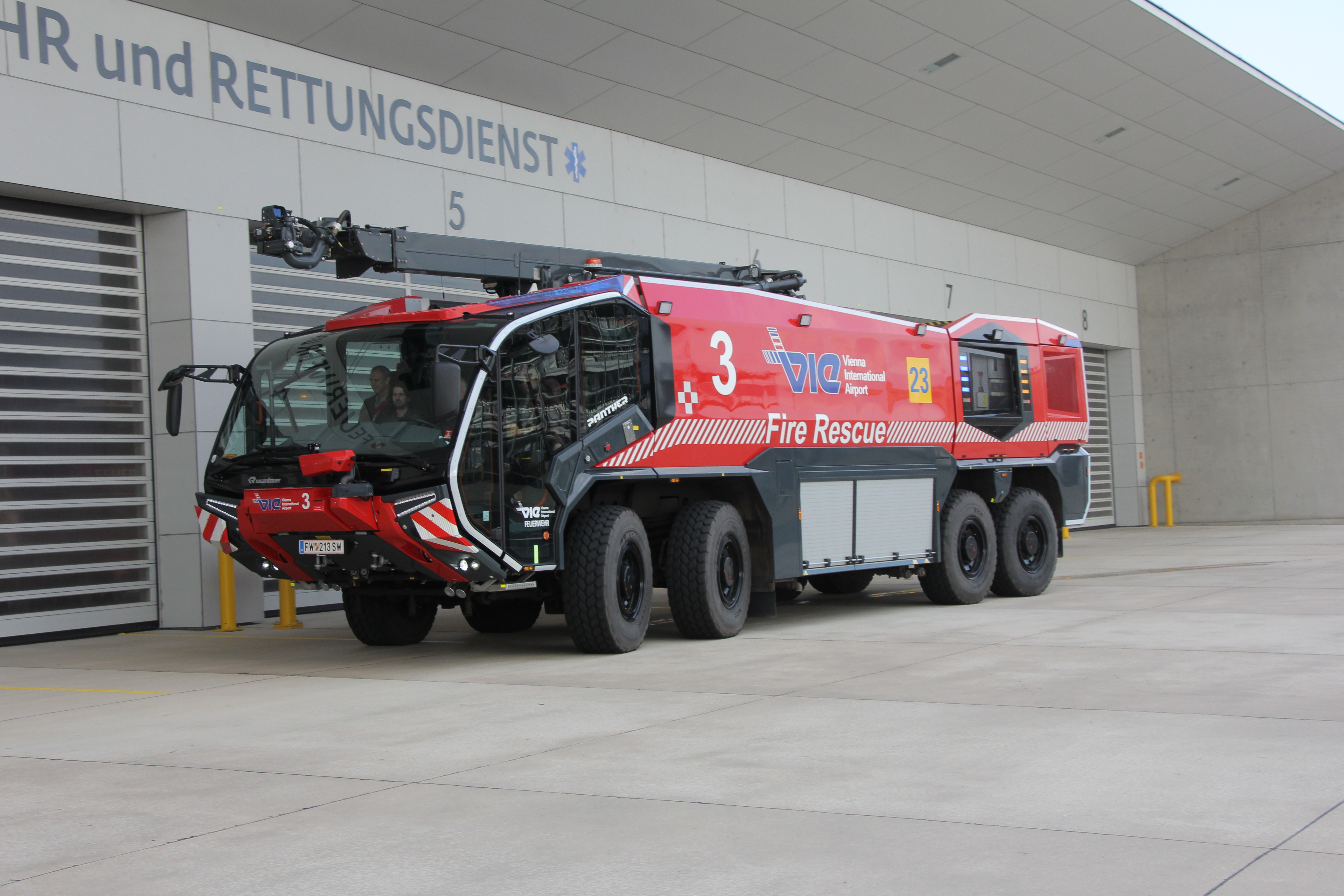 Besuch bei der Flughafenfeuerwehr am Flugafen Wien